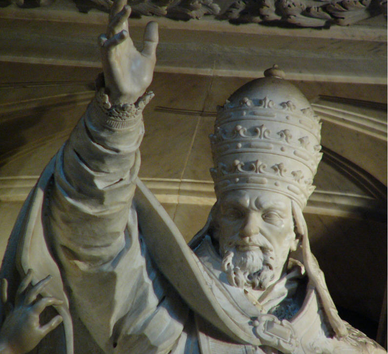 Das Foto zeigt die Darstellung Papst Innozenz' X. auf seinem Grabmal in der Kirche Sant'Agnese in Rom.